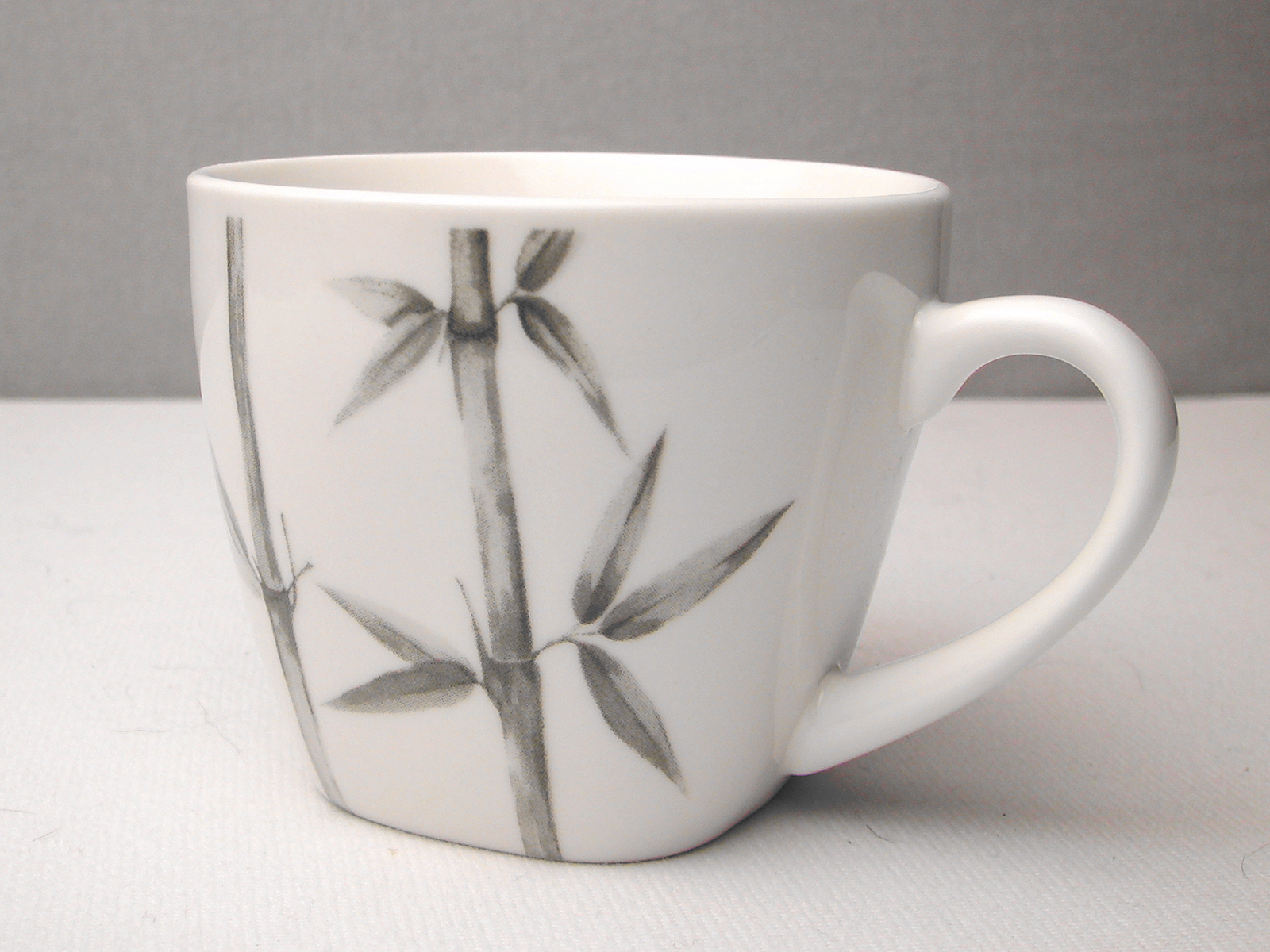 MARIA ISABEL ALIAS POSILLO, hecha de loza, decorada con dibujos de bambú.